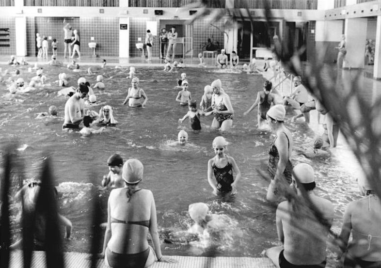 ADN-ZB Sindermann 14.2.89 Bez. Rostock: Sachzeugen-Feriendienst Kühlungsborn- Fast fünf Millionen Gäste wurden seit der Einweihung 1972 in der Meereswasser-Schwimmhalle in Kühlungsborn gezählt. Zu dieser Einrichtung des FDGB gehören mehrere gastronomische Einrichtungen. Auch für die Schüler des Kreises Bad Doberan erweist sich die Halle als nützlich - sie erhalten hier ihren Schwimmunterricht.